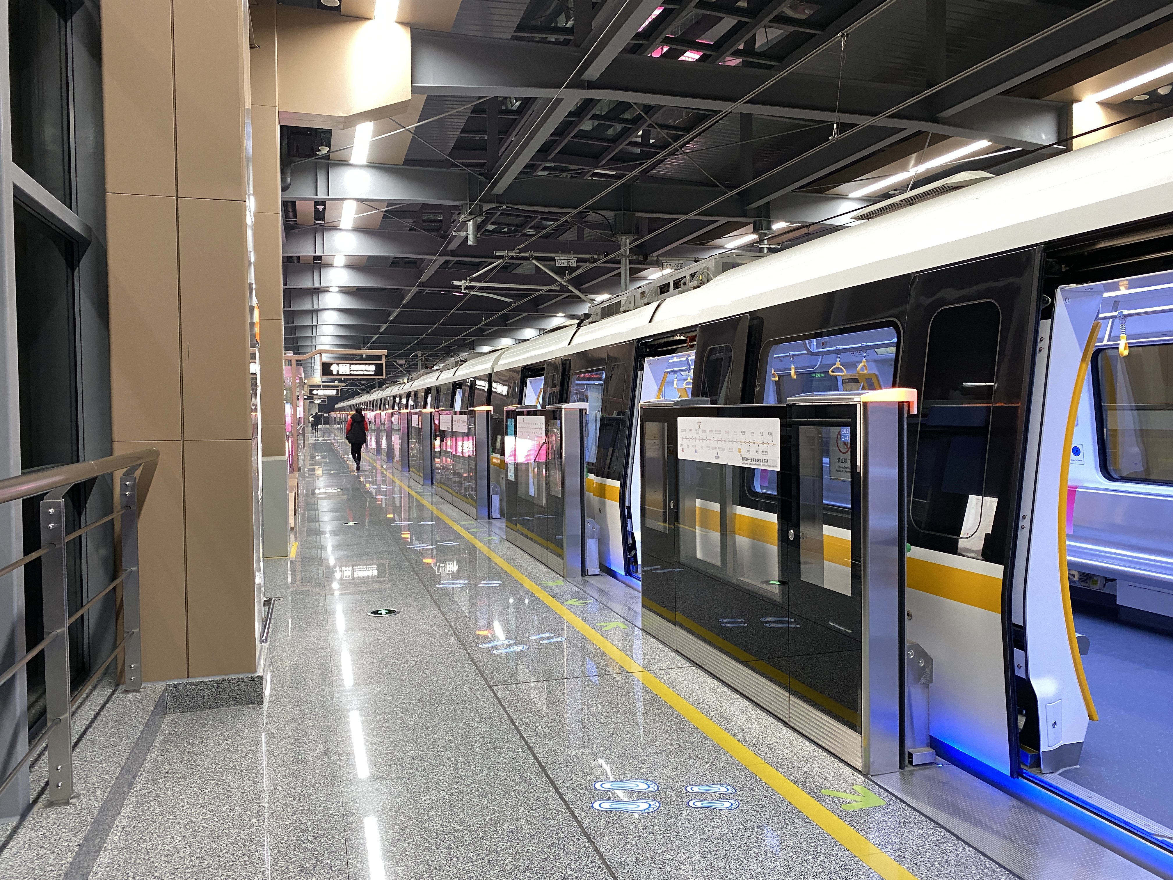 狮山站站台与列车